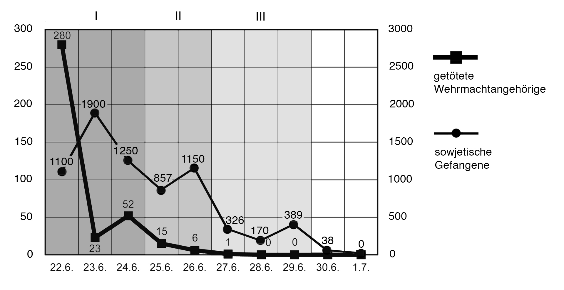 Entwicklung der deutschen Verluste an Toten und der sowjetischen Verlusten an Gefangenen in den Kämpfen um die Brester Festung im Juni 1941. Das Diagramm basiert auf Primärquellen, die ich für meine Publikationen verwendet habe. Im Diagramm fehlen etwa 52 Mann, die in den Lazaretten gestorben sind und deren Tag der Verwundung nicht festgestellt werden konnte. In den Fällen, in denen der Tag der Verwundung bekannt ist, ist der Betreffende an diesem Tag als Verlust verzeichnet. Die Quellenbasis läßt nicht immer exakte Bestimmungen der Zahl der Gefangenen für jeden Tag zu. Aufgrund dieser Ungenauigkeiten hat Diagramm lediglich Überblickscharakter und soll die Entwicklung der Intensität der Kämpfe verdeutlichen.